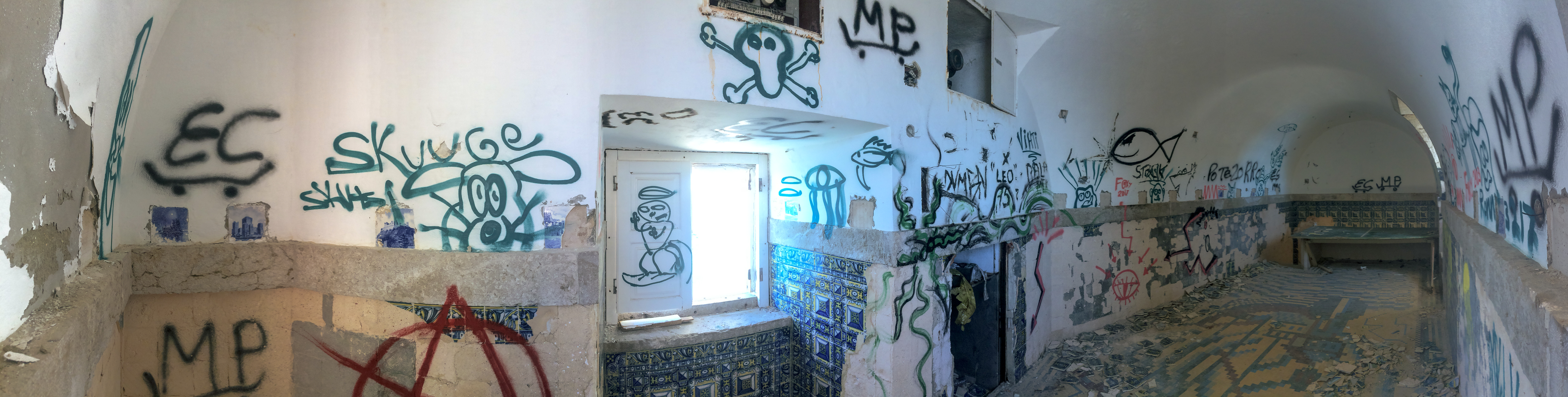 Interior do forte